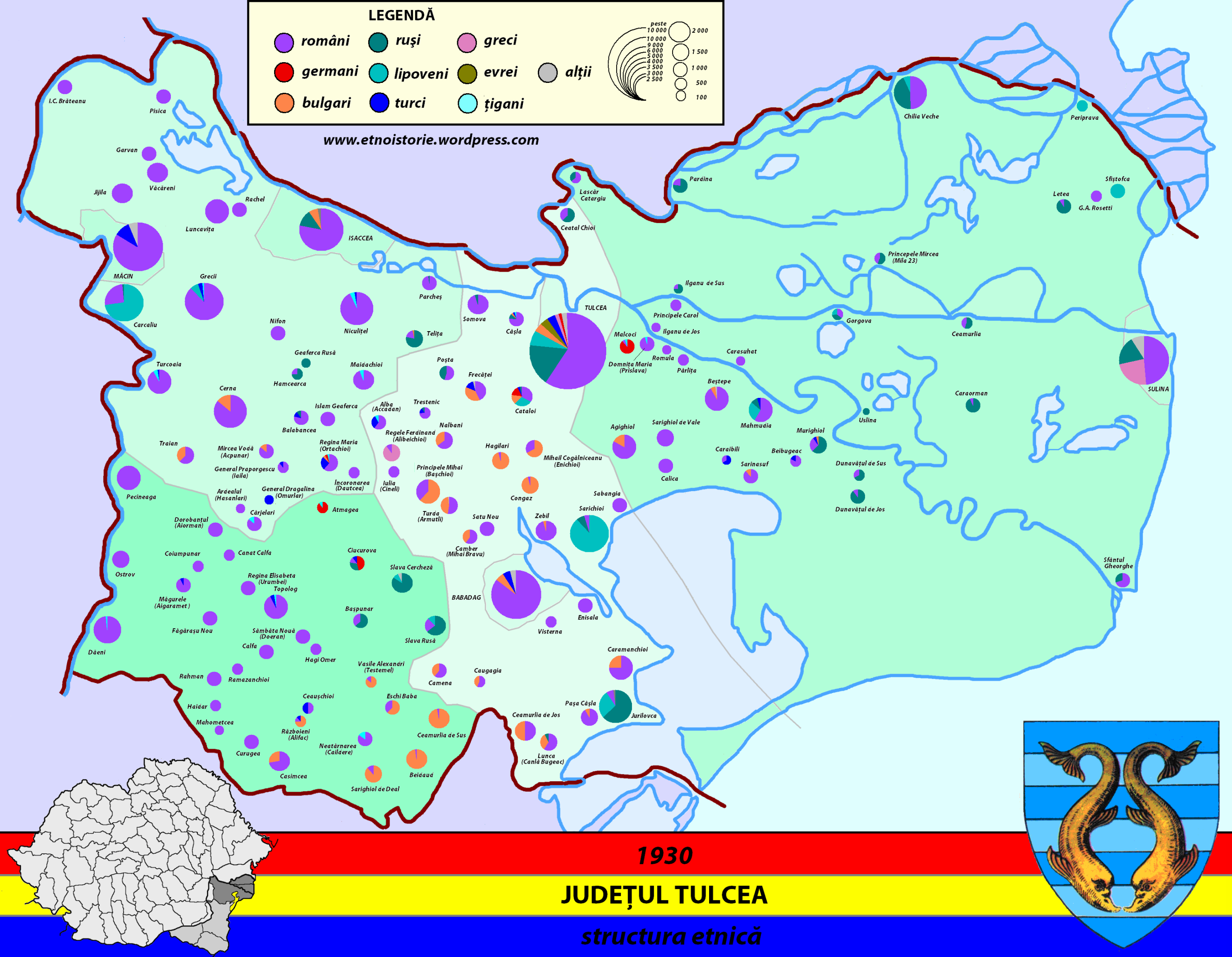 Structura etnică a judetului Tulcea (1930)